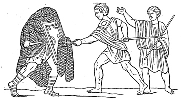 Secutor en Retiarius - afkomstig uit Meyers Konversationslexikon 1888 - vrij van auteursrechten